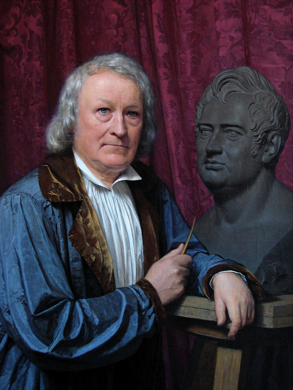 Udsnit af Bertel Thorvaldsen i sit atelier (med Adam Oehlenschläger) af Johan Vilhelm Gertner (1818-1871), Thorvaldsens Museum, København